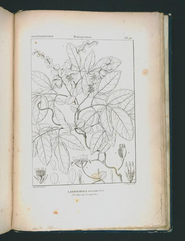 Icones selectae plantarum quas in systemate universali :ex herbariis parisiensibus, praesertim ex Lessertiano /descripsit Aug. Pyr. de Candolle, ex archetypis speciminibus a P.J.F. Turpin delineatae et editae a Benj. De Lessert ...